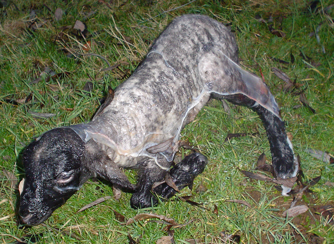 Ovis orientalis aries